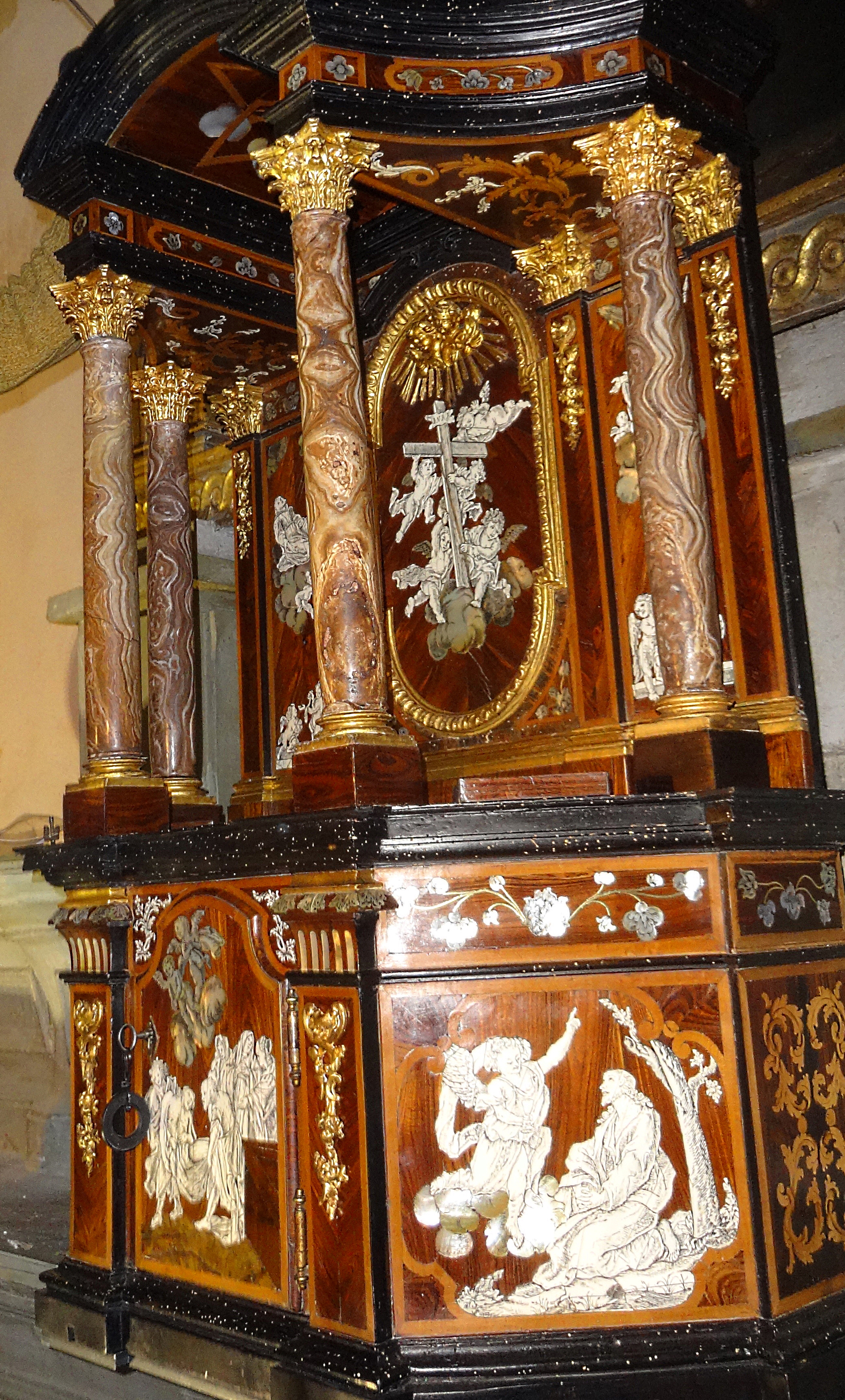 Tabernacle à 3 registres en bois sculpté, marqueté et doré réalisé en 1746 par Luigi Prinotto, l'un des meilleurs ébénistes du royaume de Piémont-Sardaigne (date et signature au dos). Orné à l'origine de 4 colonnes en onyx, il propose également des scènes de marqueterie en ivoire et nacre gravés Il est exposé dans la chapelle de la Piétà, situé dans l'ancienne cathédrale Saint Michel à Sospel, Alpes-Maritimes, France. Objet référencé dans la Base Palissy